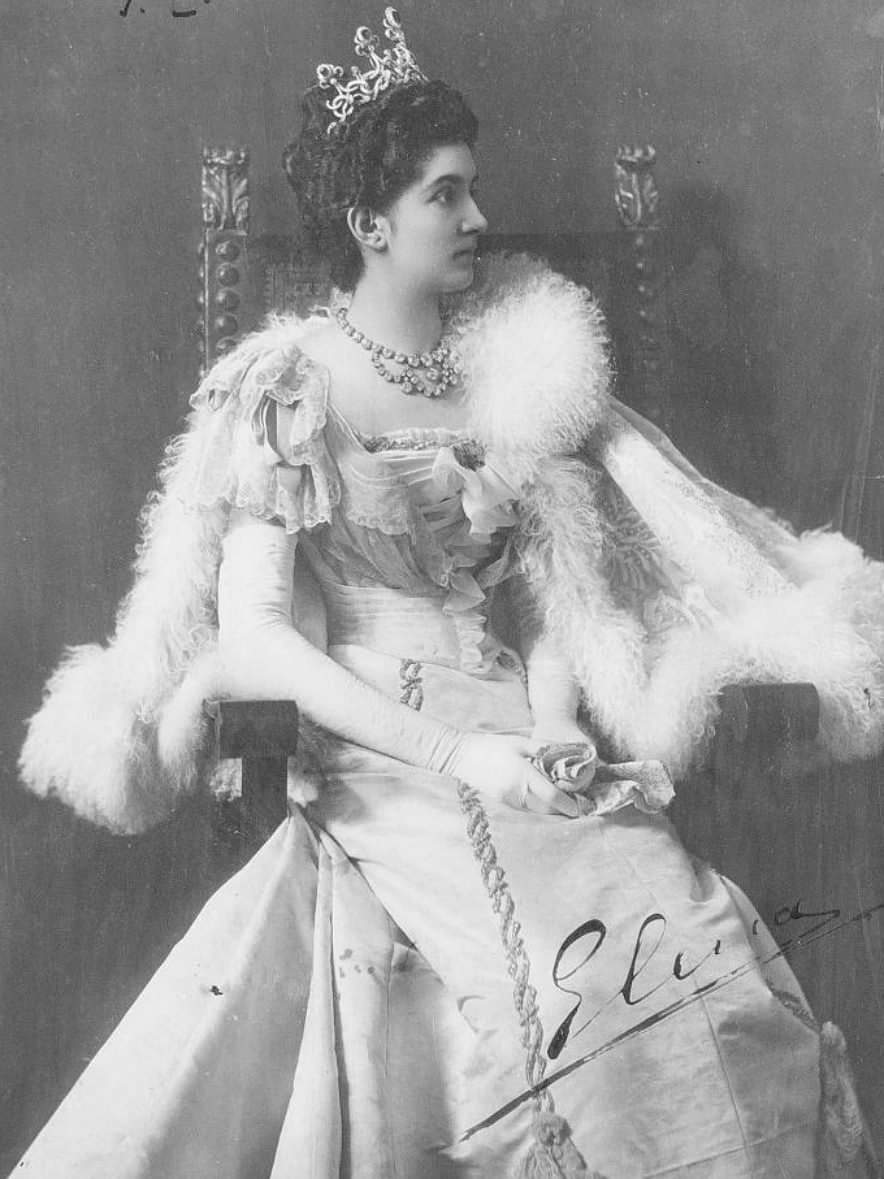 La principessa Elena di Montenegro (1873-1952)